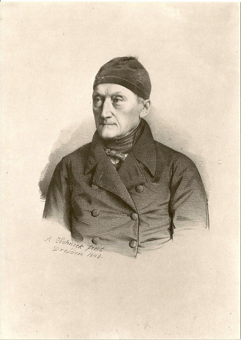 „Stammvater“ Christoph Hans von Egidy (1772 – 1843) Majoratsherr auf Kreinitz und Naunhof